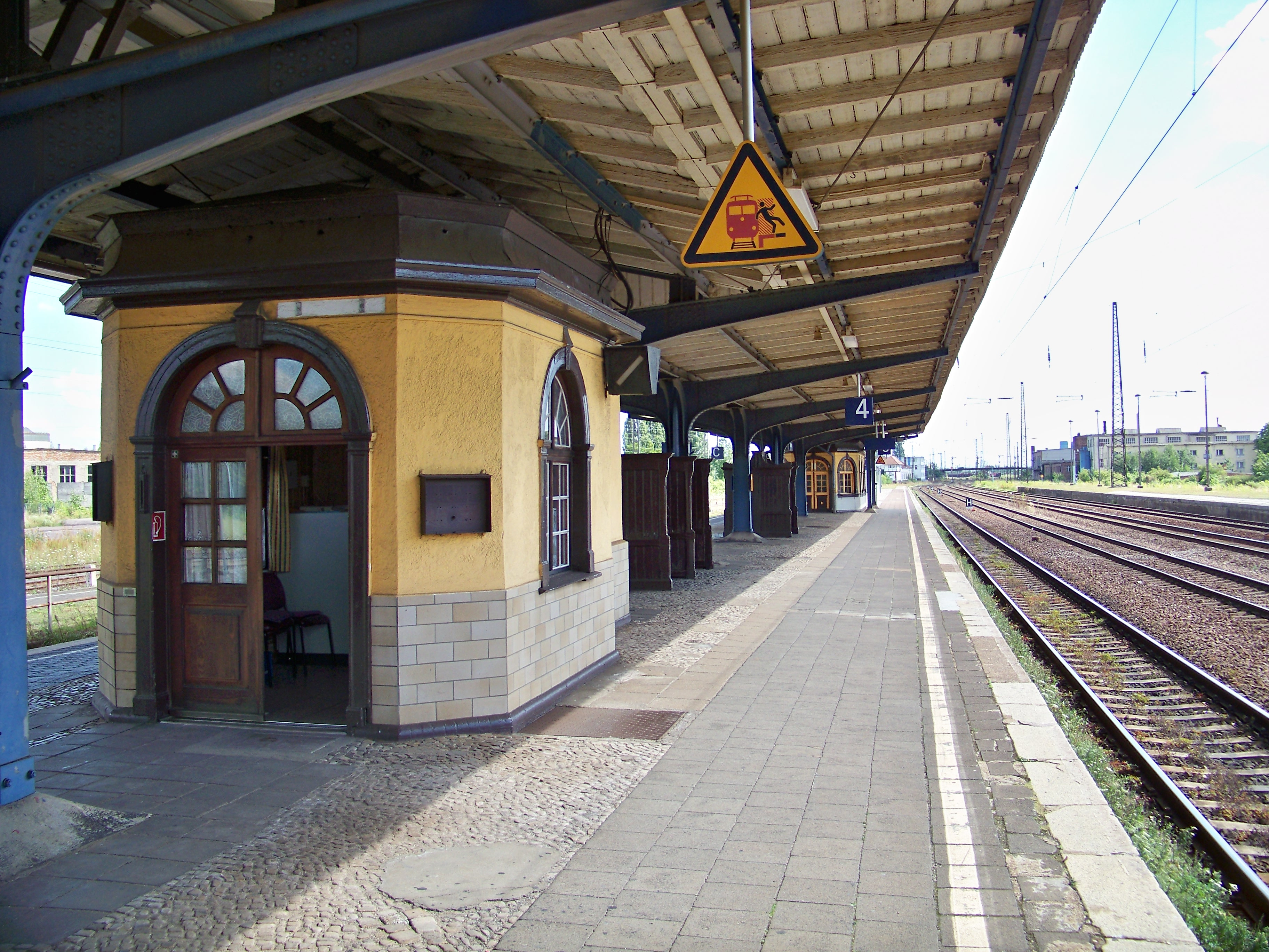 Bahnsteige des Bahnhofs Köthen (Anhalt)